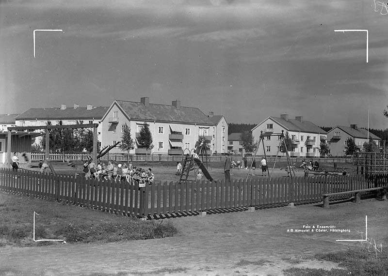 Lekplatsen vid Bäckvägen, Haga; Bostadsbebyggelse; Byggnadsverk; Lekplats; Parker och trädgårdar